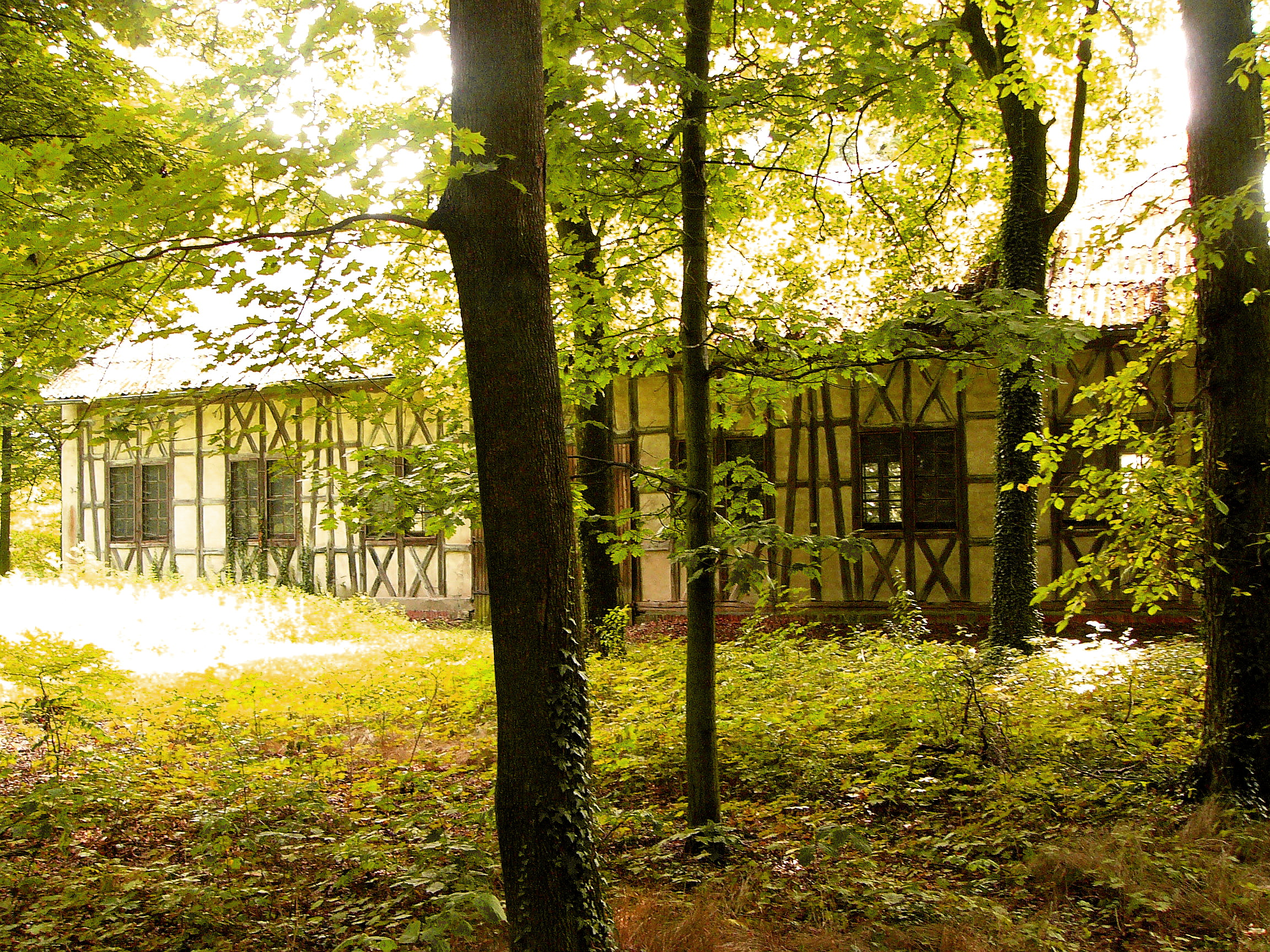 Dobra - spichrz, XVIII